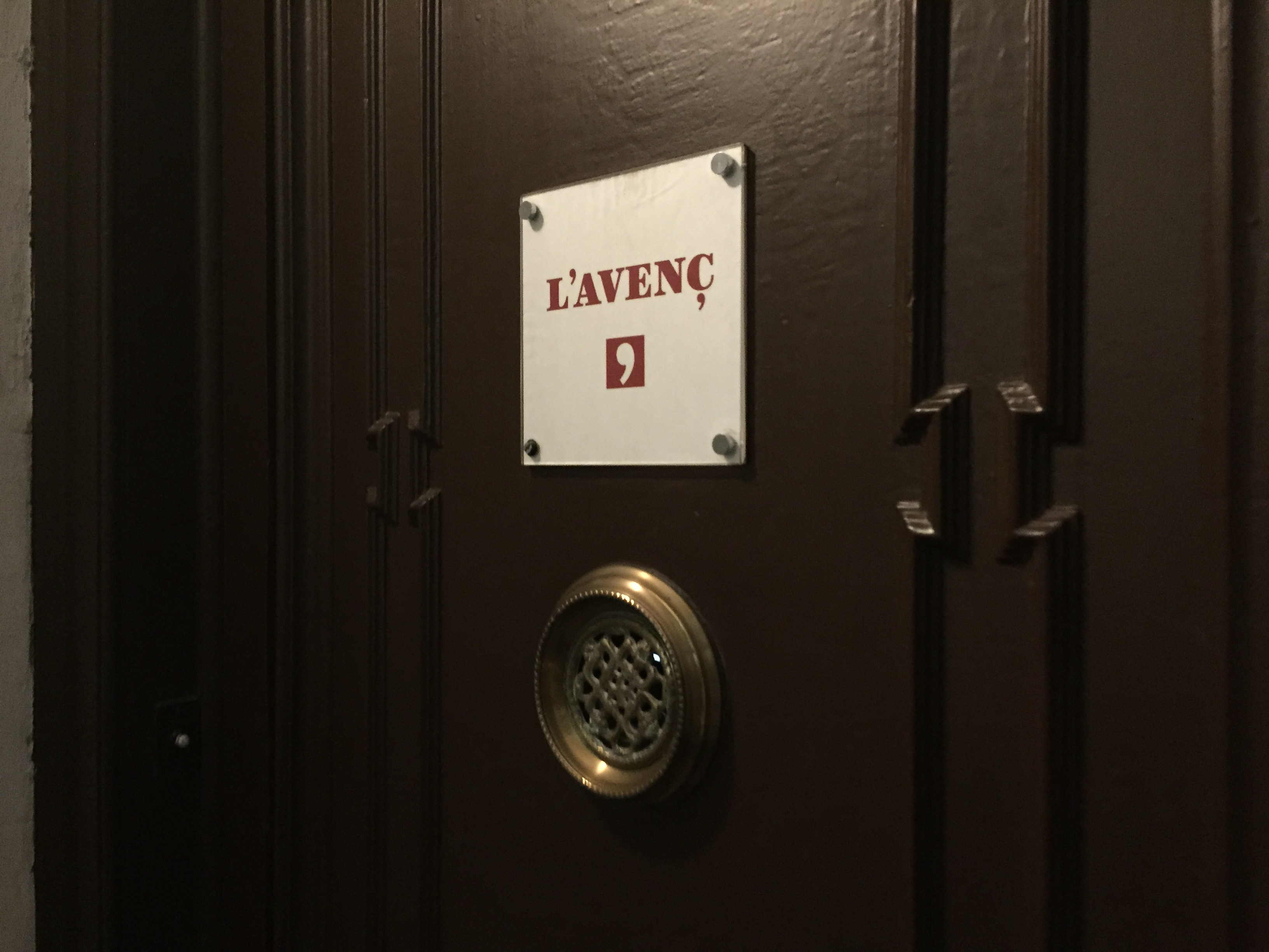 entrada l'avenç